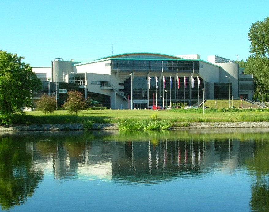 Hala Łuczniczka w Bydgoszczy